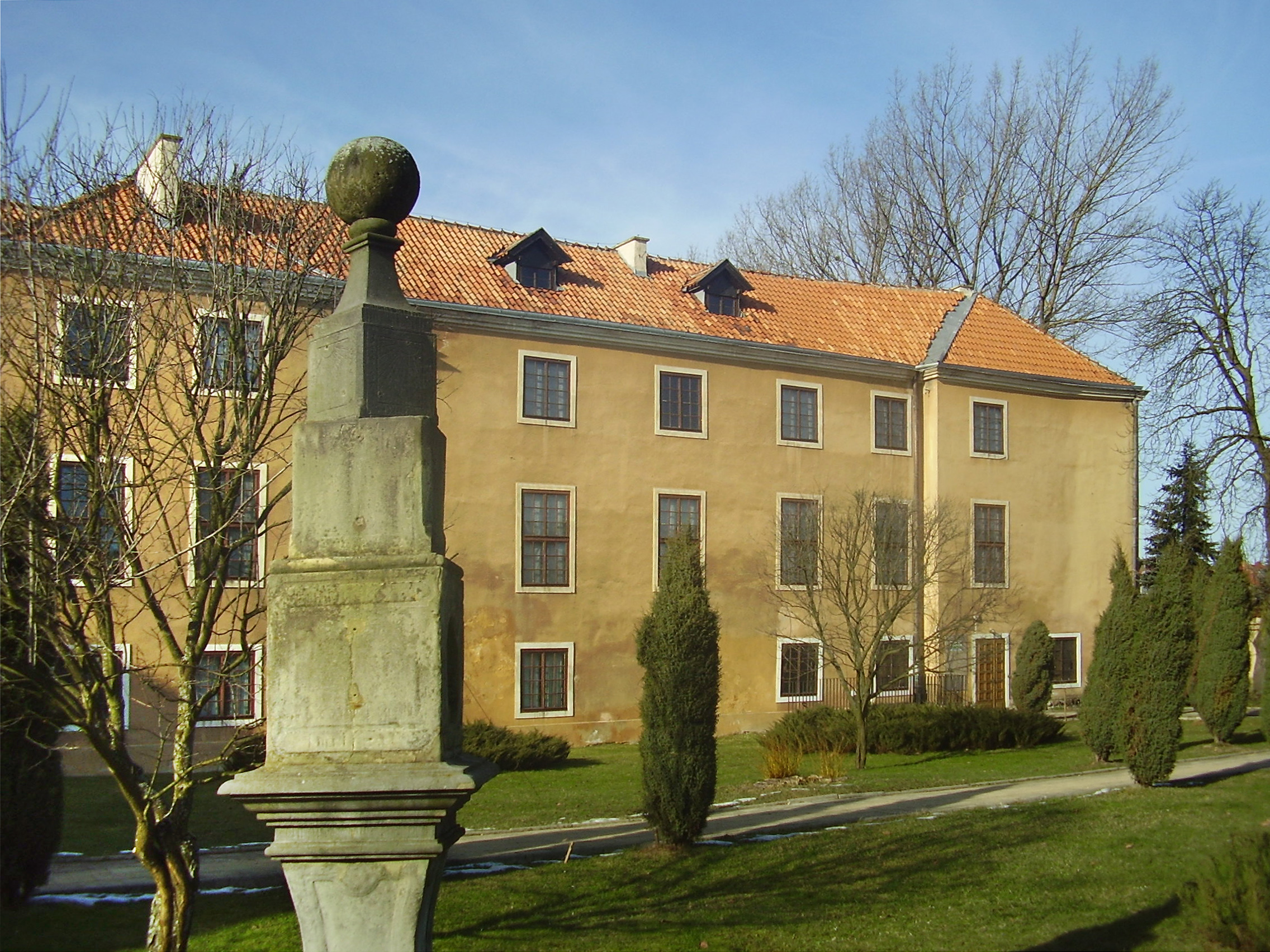 Prawe skrzydło pałacu Dohnów